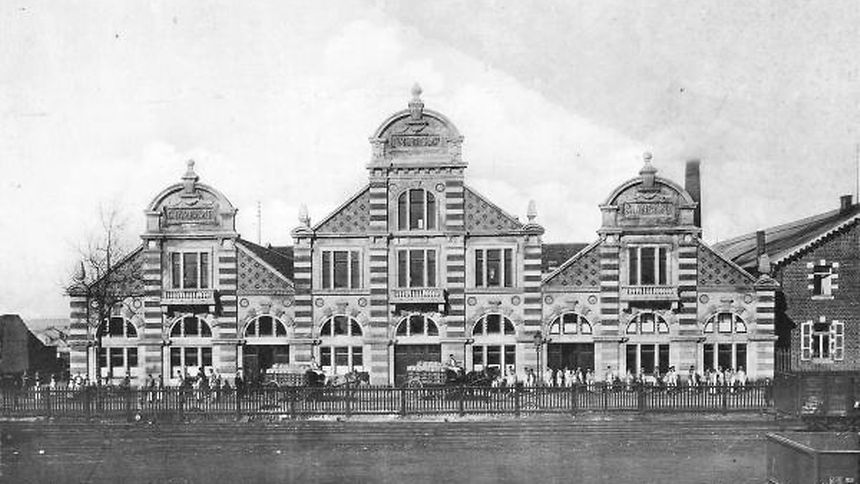 D'"Champesfabrik" op der Gare sou wéi de Charles Bernhoeft se gesinn huet.